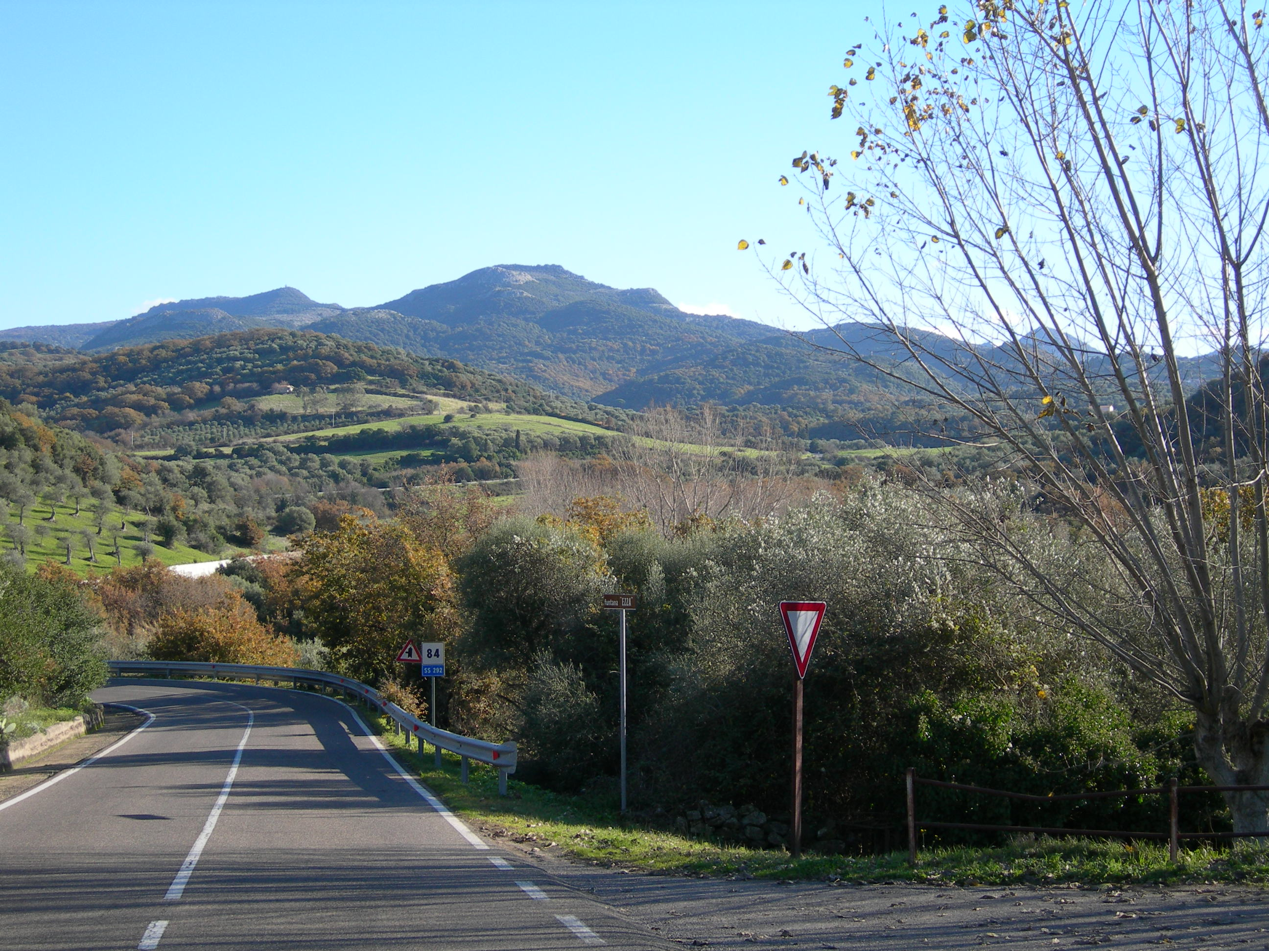 Montiferru sardinia- sardegna